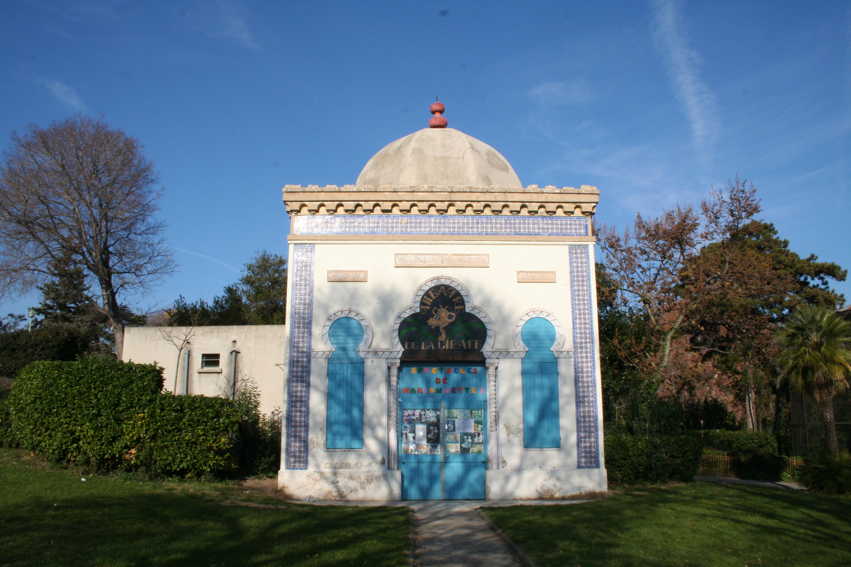 Palais Longchamp, Marseille (France).